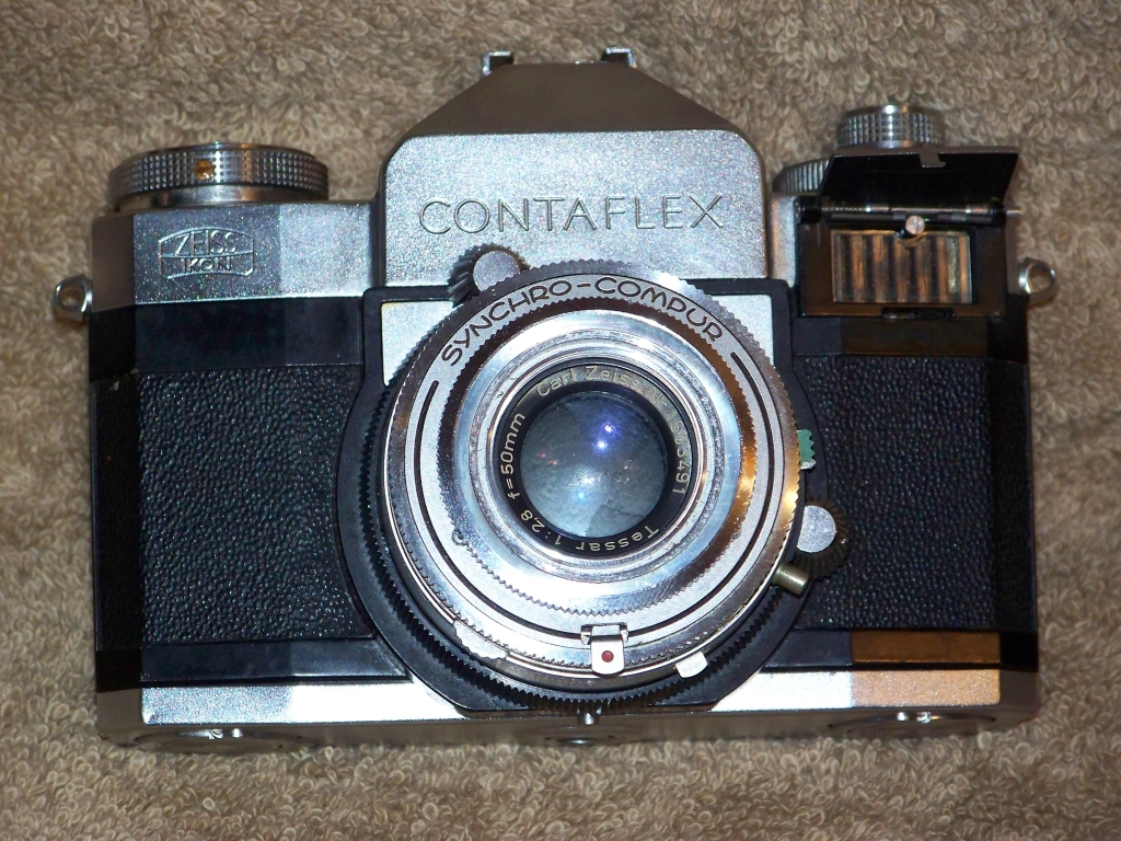 Zeiss Ikon Contaflex